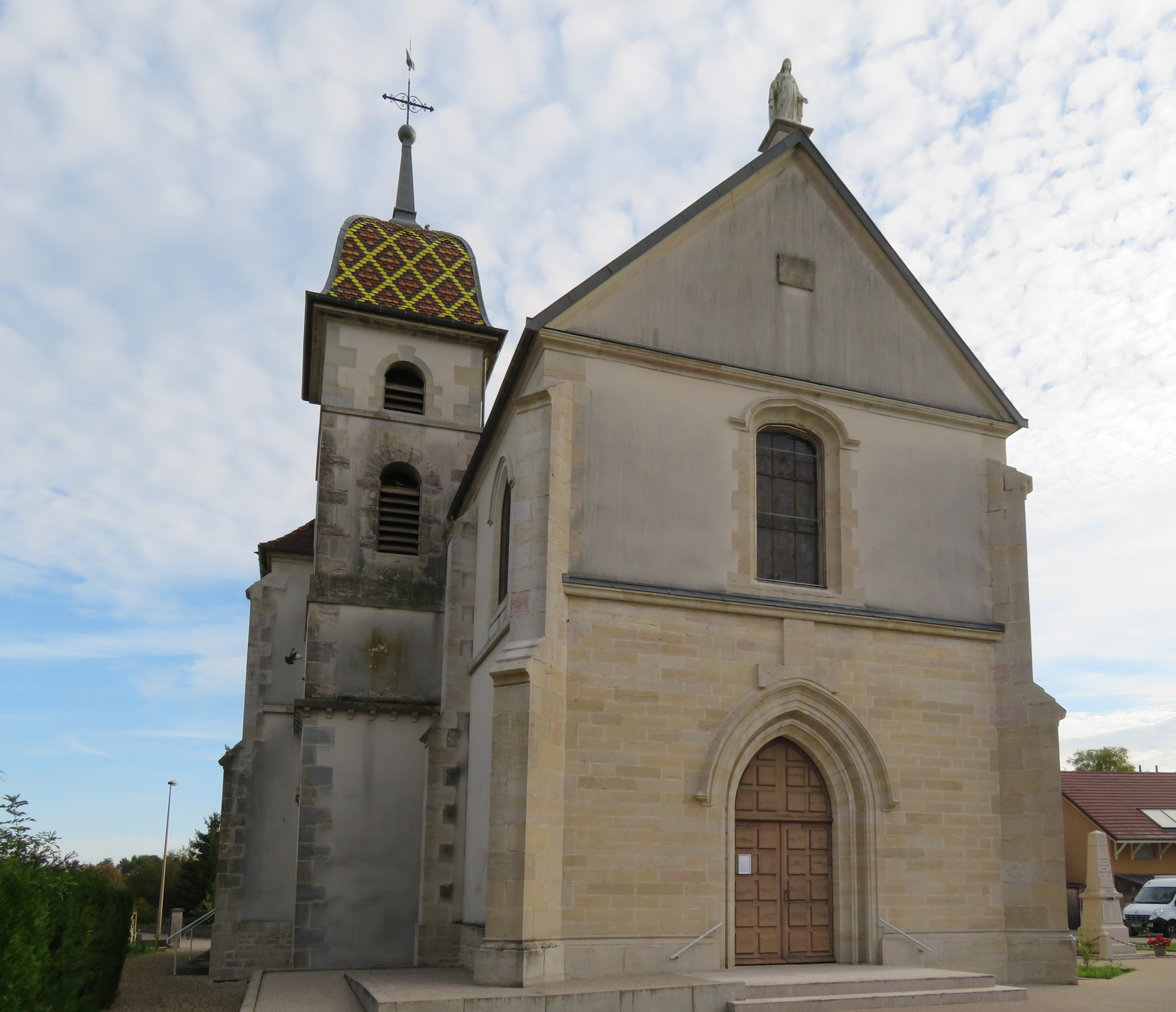 Église Saint-Martin de la commune de Peseux (Jura).